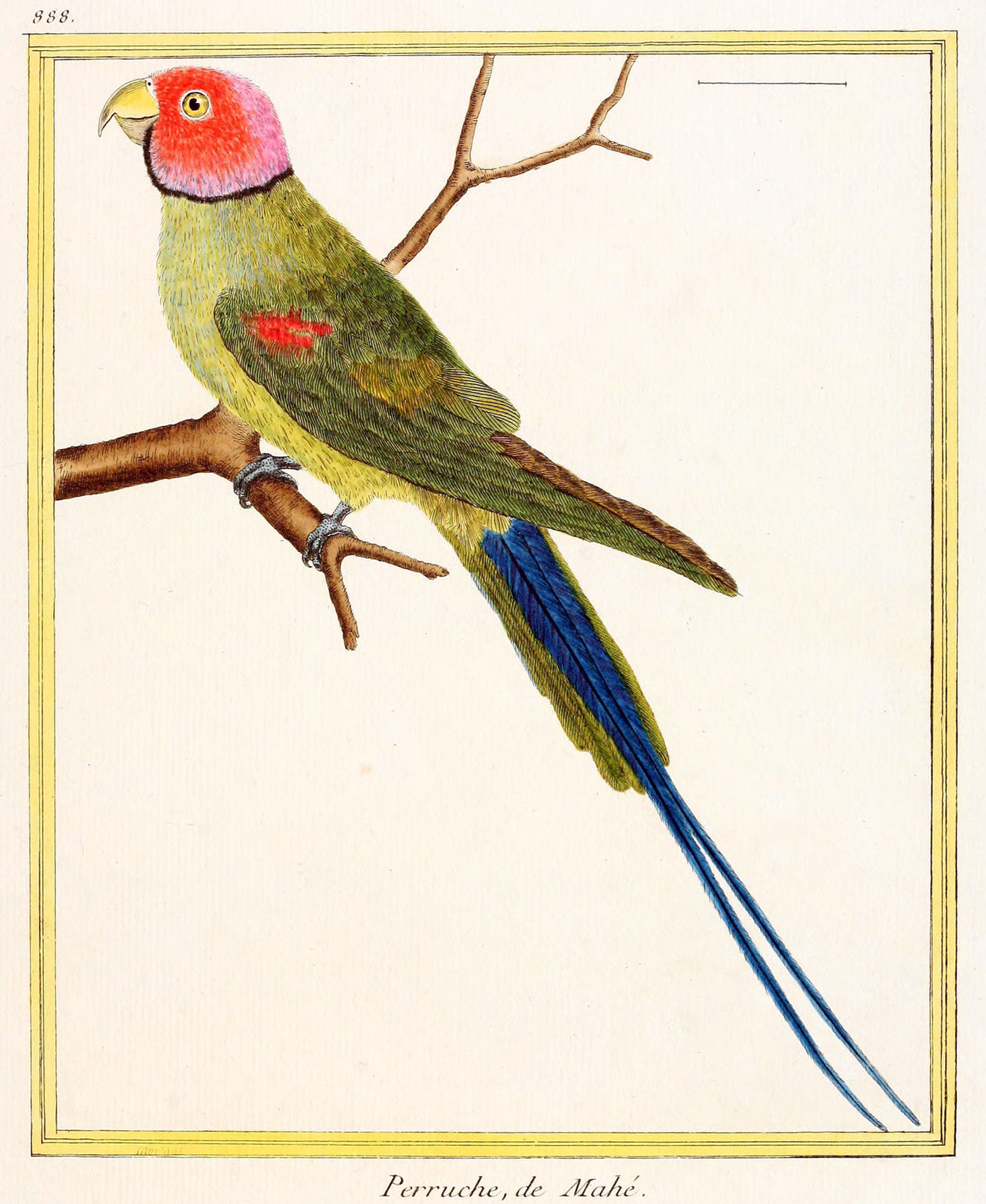 Perruche, de Mahé [Parakeet of Mahé] Plate 888 from Histoire Naturelle Des Oiseaux. Psittacula cyanocephala, formerly P. bengalensis.[1] By François-Nicolas Martinet (c. 1725-c. 1804) (artist and engraver) Comte de Buffon (Georges Louis Leclerc) (1707-1788) (editor).